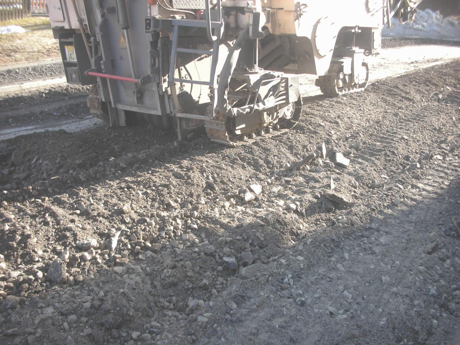 Kaltasphaltfräse